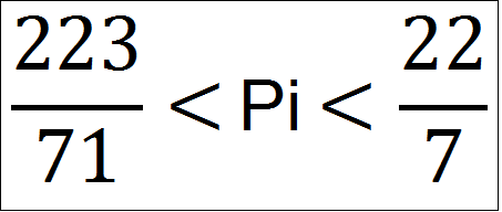 صورة تمثل تأطيرا للعدد باي من خلال عددين كسريين